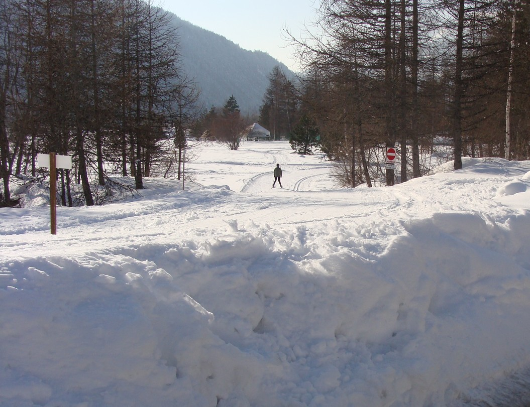 Piste de ski de fond dans le vallon du Drac d'Orcières (Hautes-Alpes).